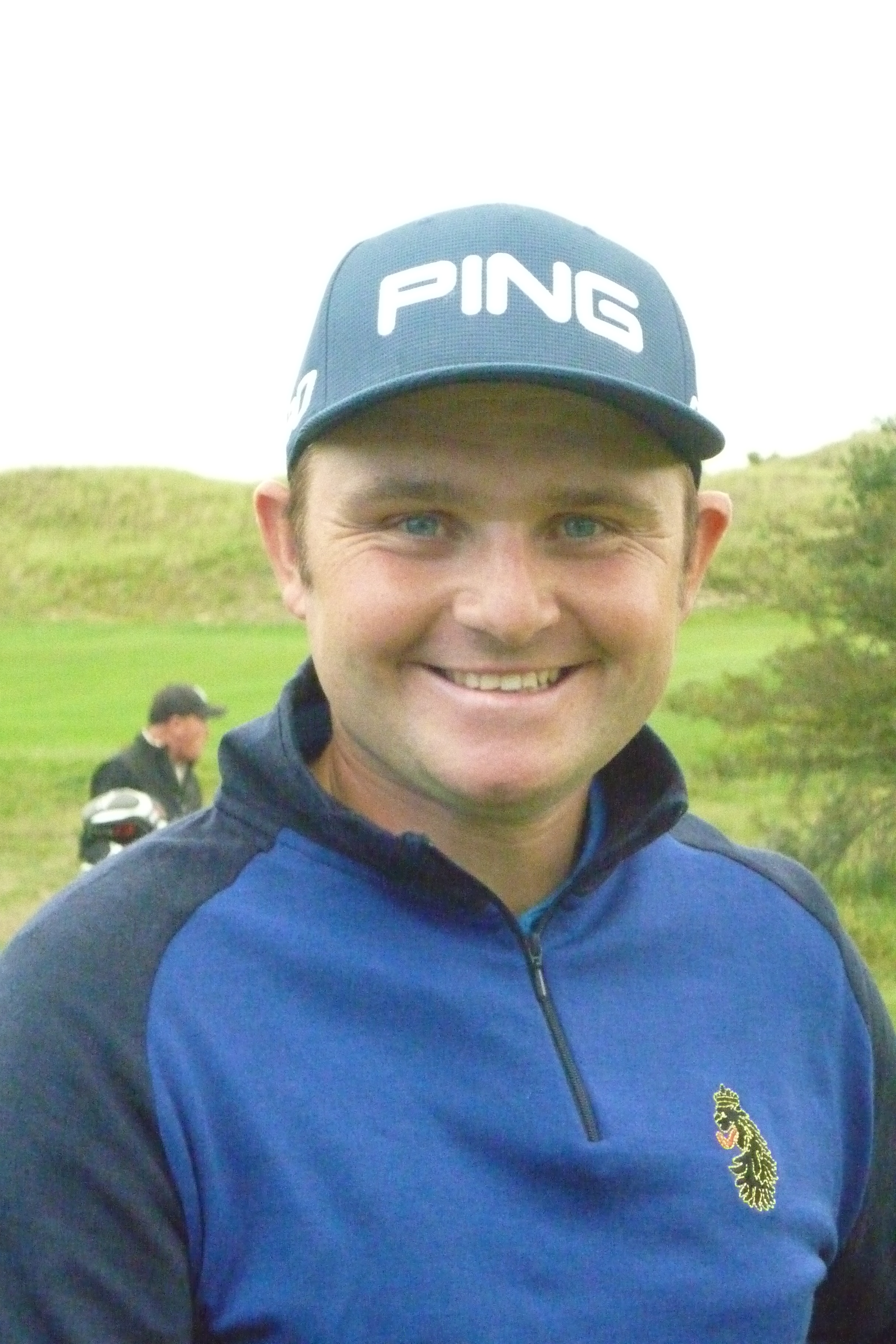 Andy Sullivan KLM Open 2014